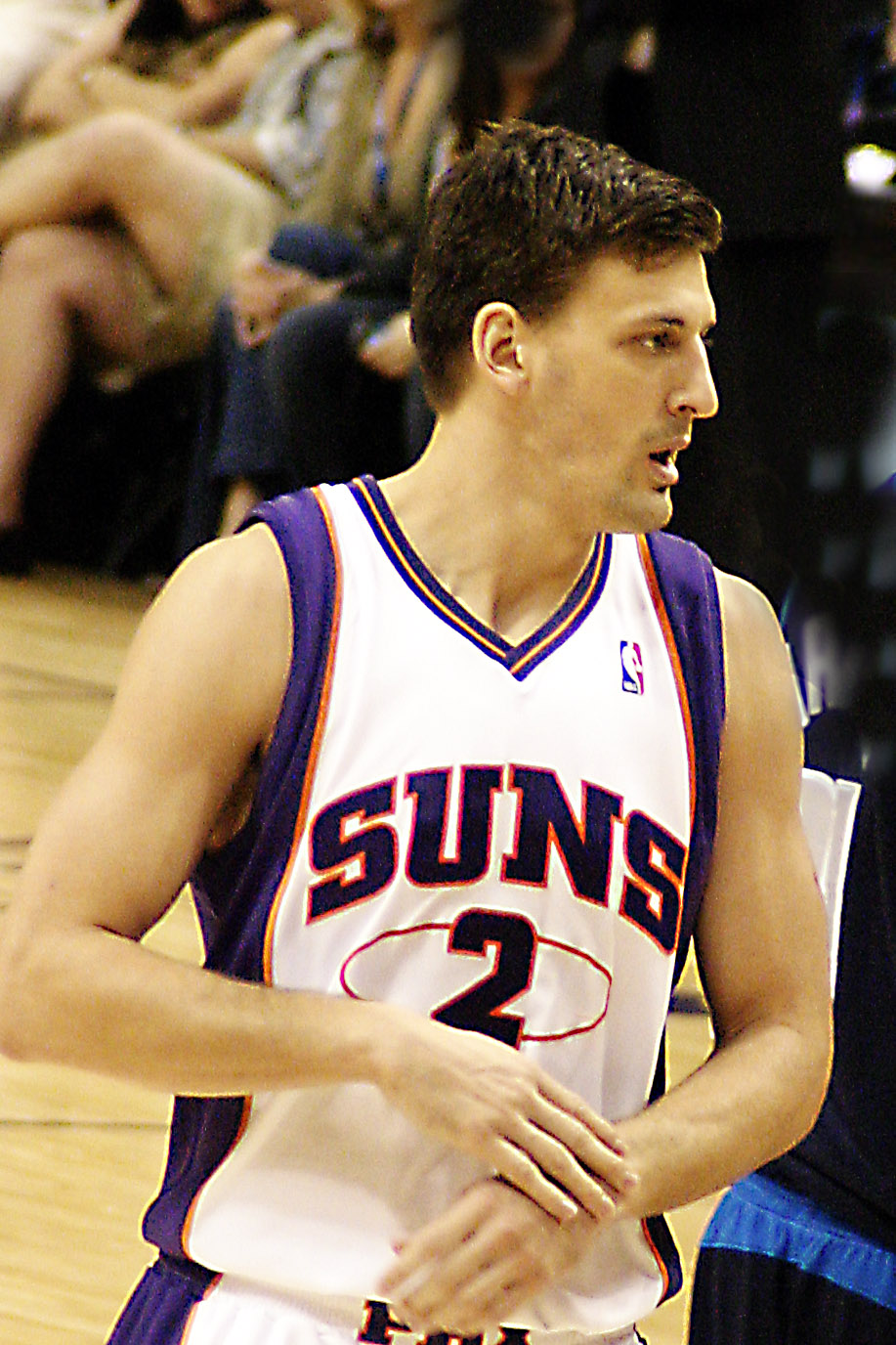 G.G.